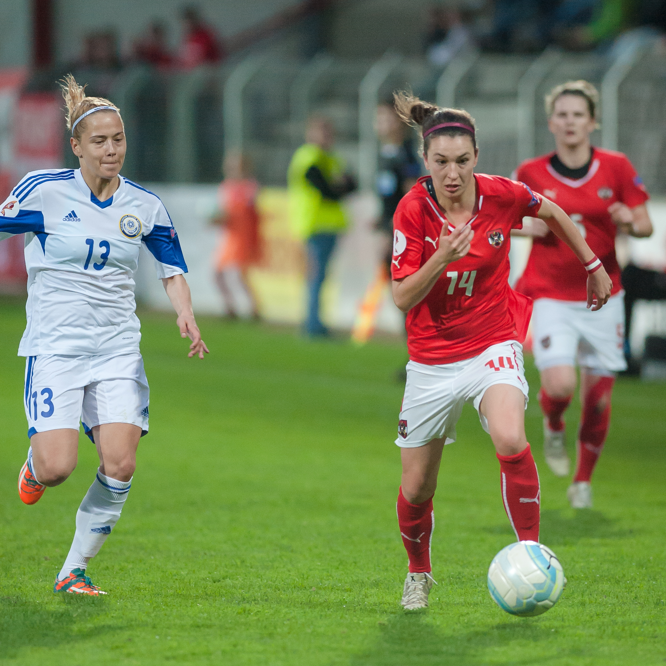 Steyr, Austria, 06.04.2016, ÖFB Frauen EM-Qualifikation - Österreich vs Kasachstan. Bild zeigt Yuliya Nikolayenko (KAZ) und Barbara Dunst (AUT).